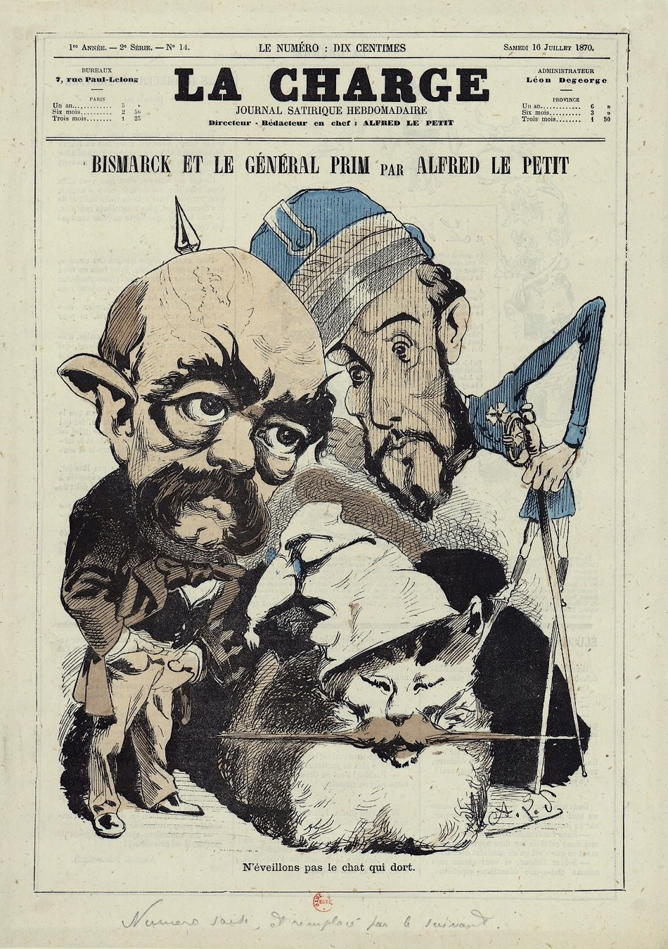 Bismarck et le général Prim Dessin d'Alfred Le Petit pour son journal La Charge n°14, 16 juillet 1870. Numérisation Gallica.